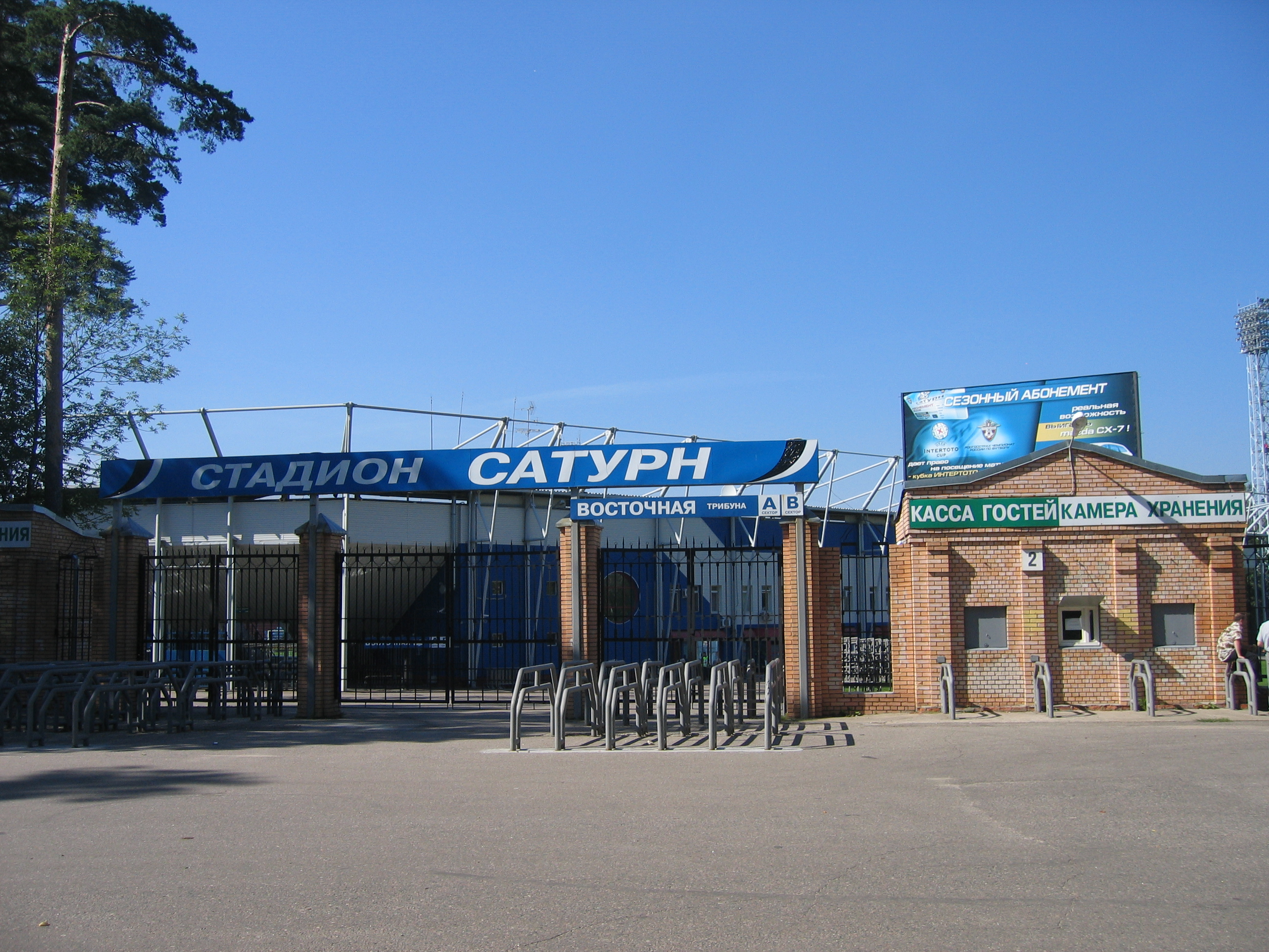 Das Saturn-Stadion in Ramenskoje, Russland